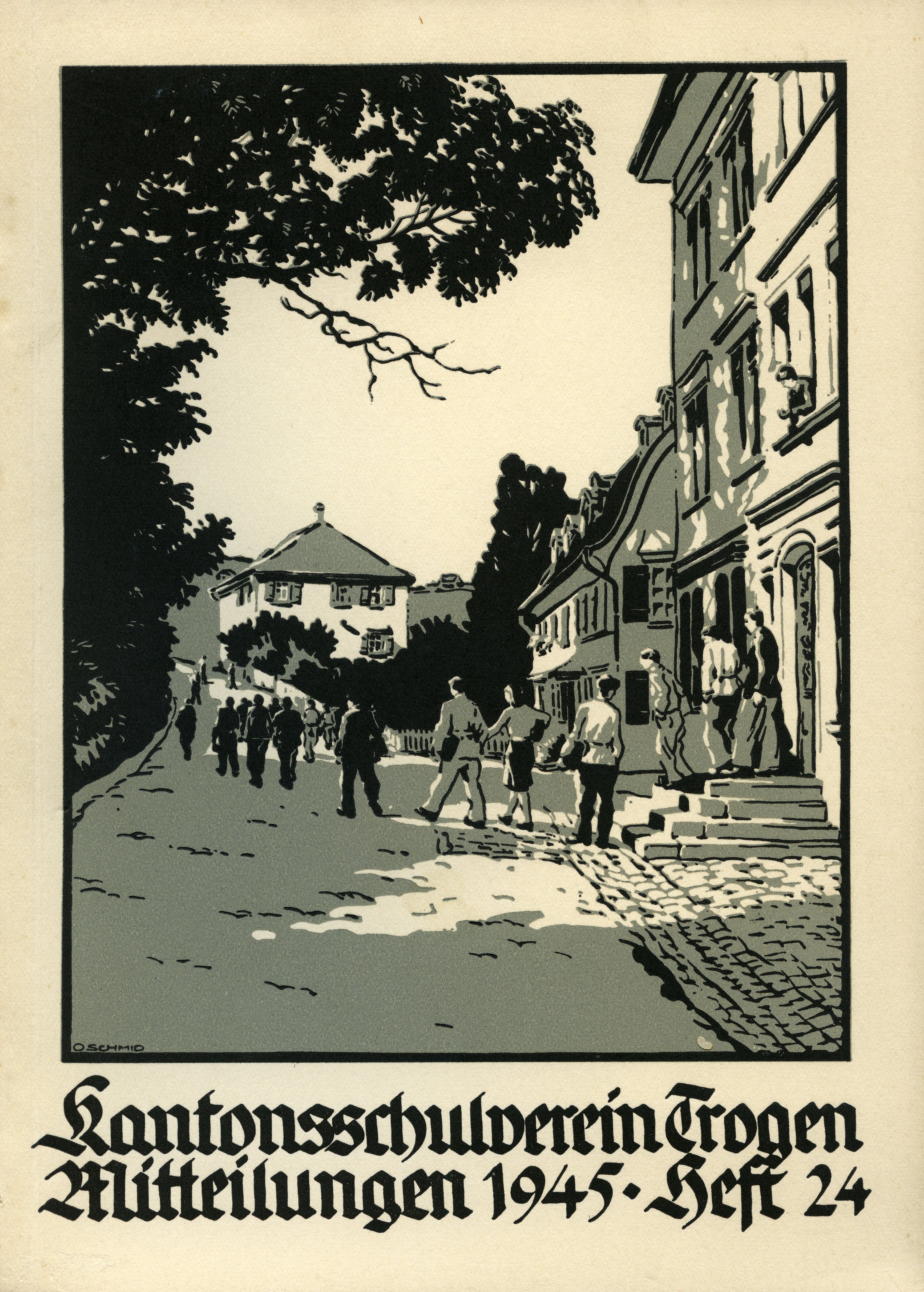 Titelbild der KVT-Mitteilungen Nr. 24 (1945): Kantonsschulgebäude (v.l.n.r: Olymp, Altes Konvikt, Altes Schulhaus). Linolschnitt von Otto Schmid (1889 - 1974)